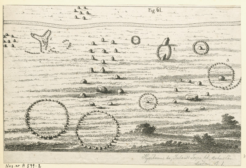 RAÄ-nr: Hjärtum 93:1. Gravfält nära Hjärtums kyrka. Illustration i N. H. Sjöborgs Samlingar för Nordens fornälskare, b 1 fig 61, 1822. Motiv: Hjärtum 93:1 Kategori: Teckning, Gravfält RAÄ-nr: Hjärtum 93:1. Gravfält nära Hjärtums kyrka. Illustration i N. H. Sjöborgs Samlingar för Nordens fornälskare, b 1 fig 61, 1822. Hjärtum 93:1.